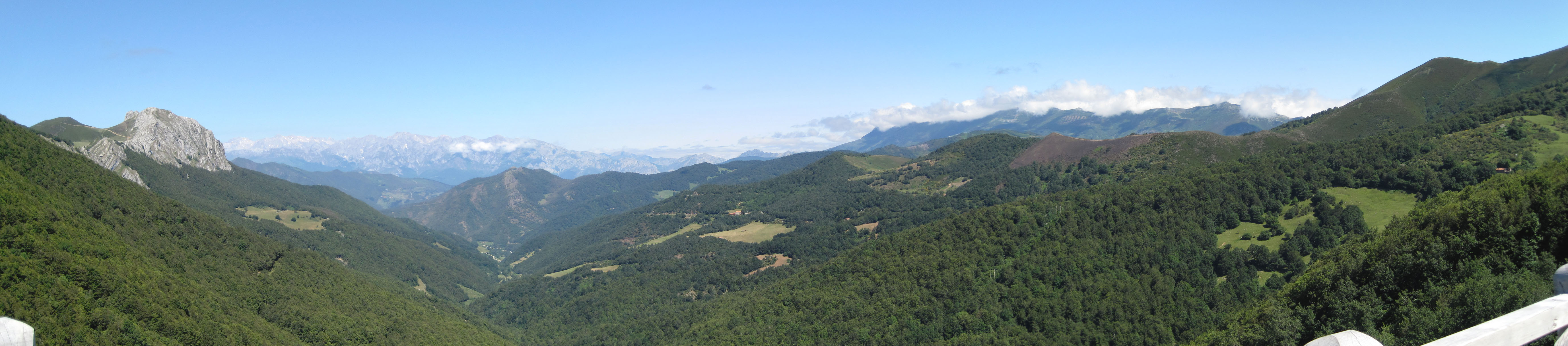 Vista panorámica de Liébana y Picos de Europa desde el puerto de Piedrasluengas (Palencia, España).